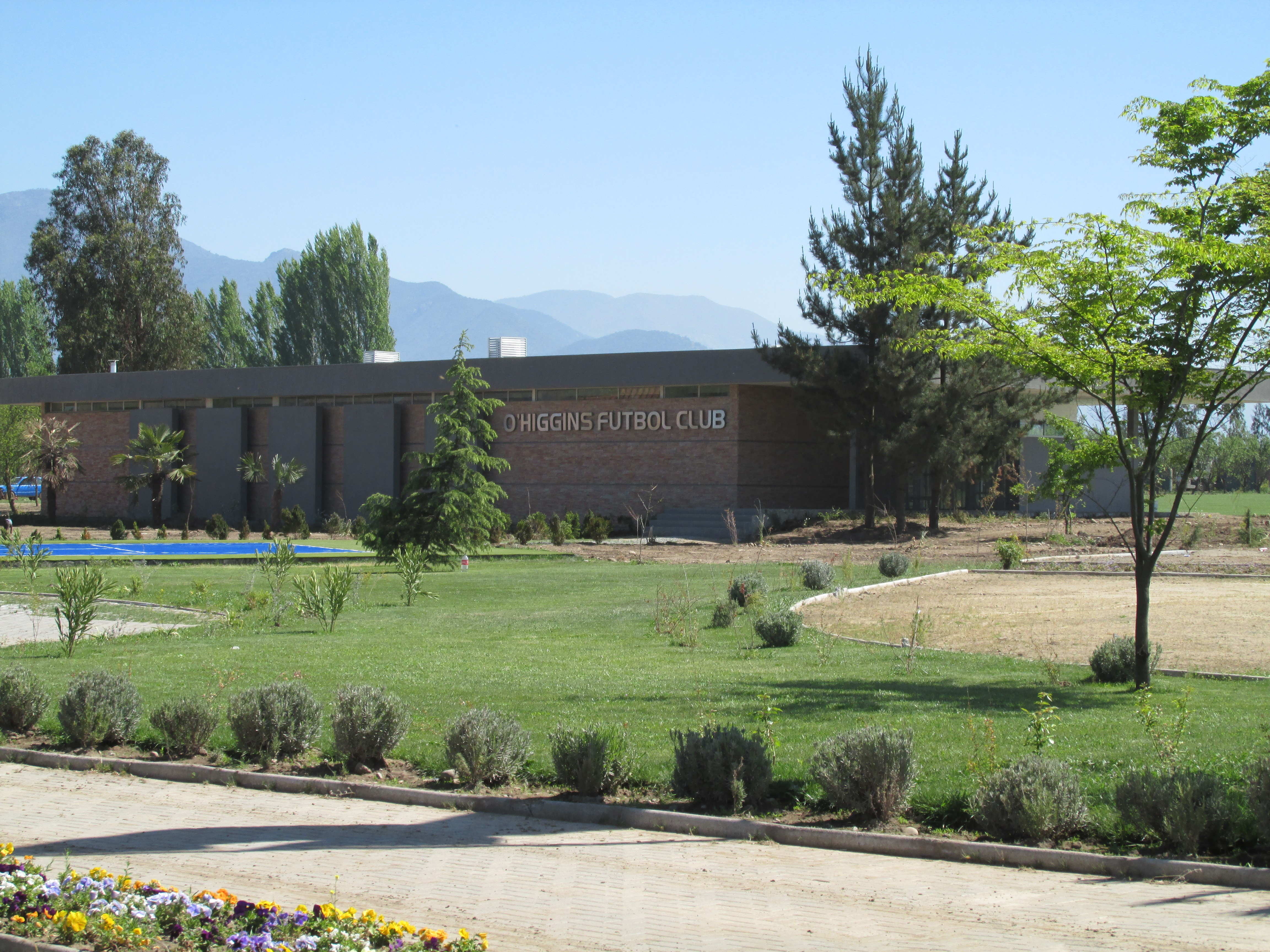 Complejo Deportivo Monasterio Celeste en Requinoa